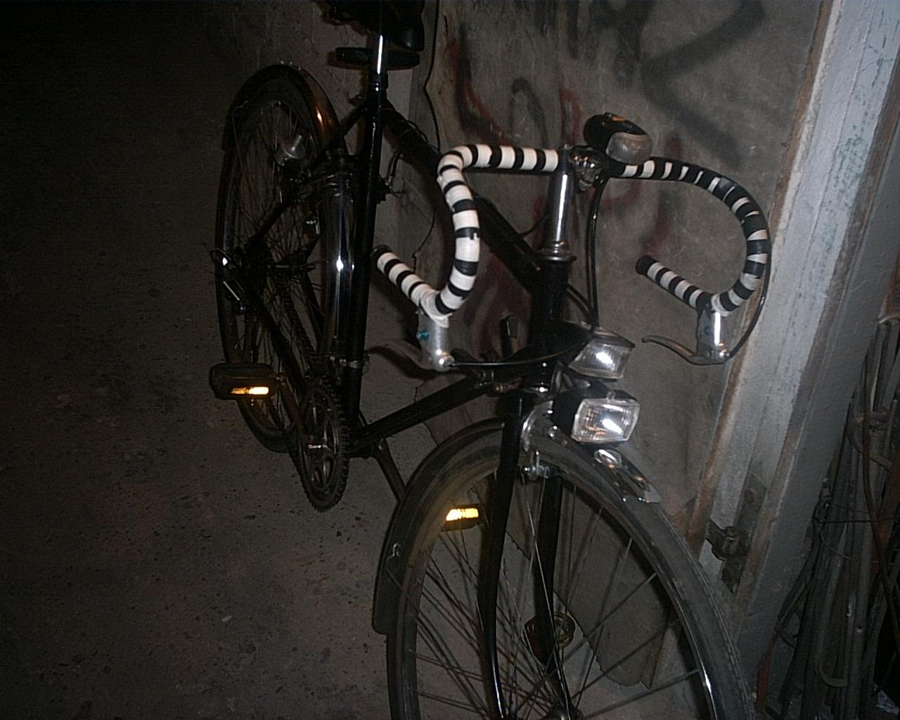 Romet Albatros bicycle.